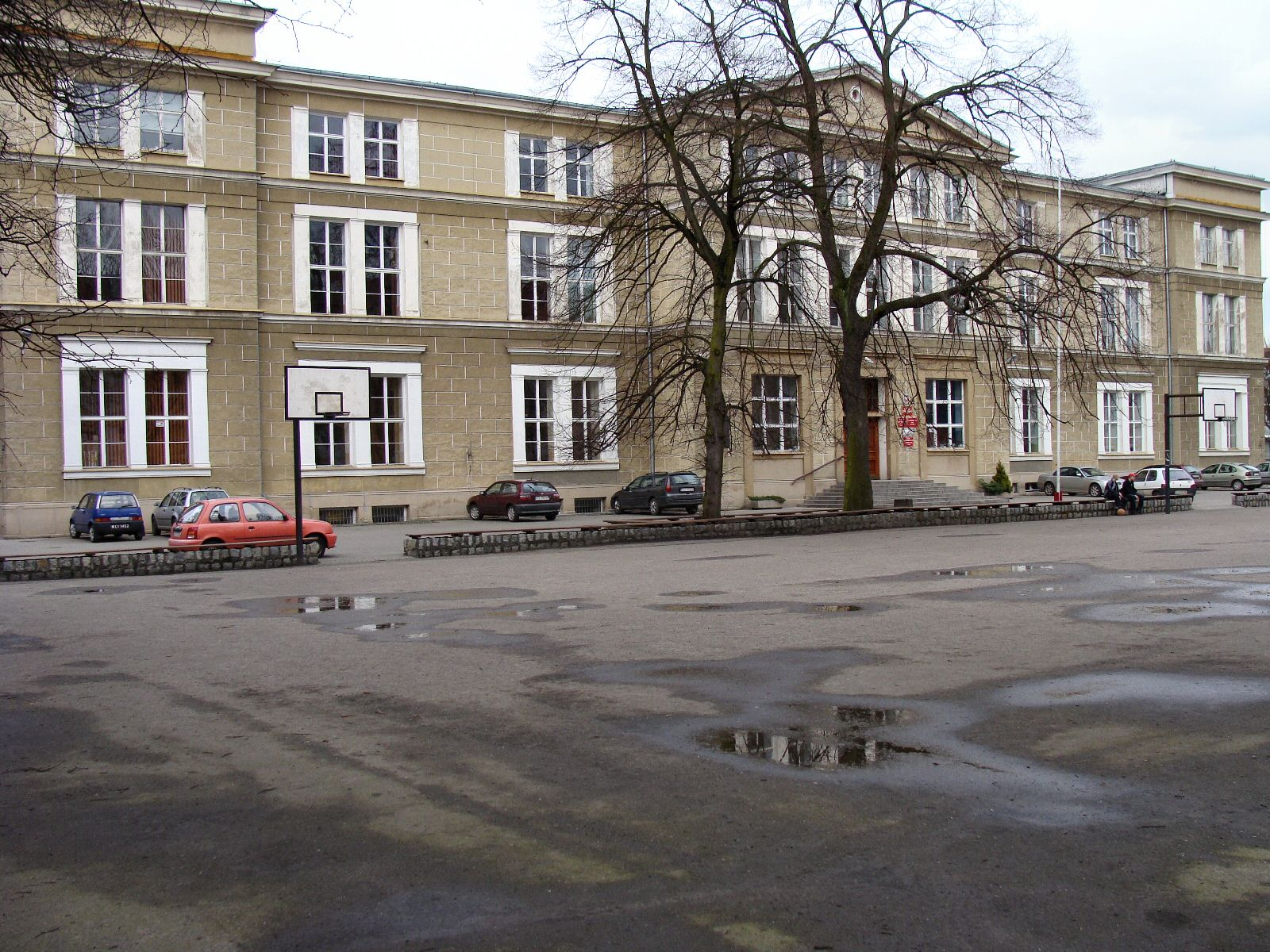 IX Liceum Ogólnokształcące (dawne Gimnazjum Mariackie) przy pl. Mariackim 1 w Szczecinie